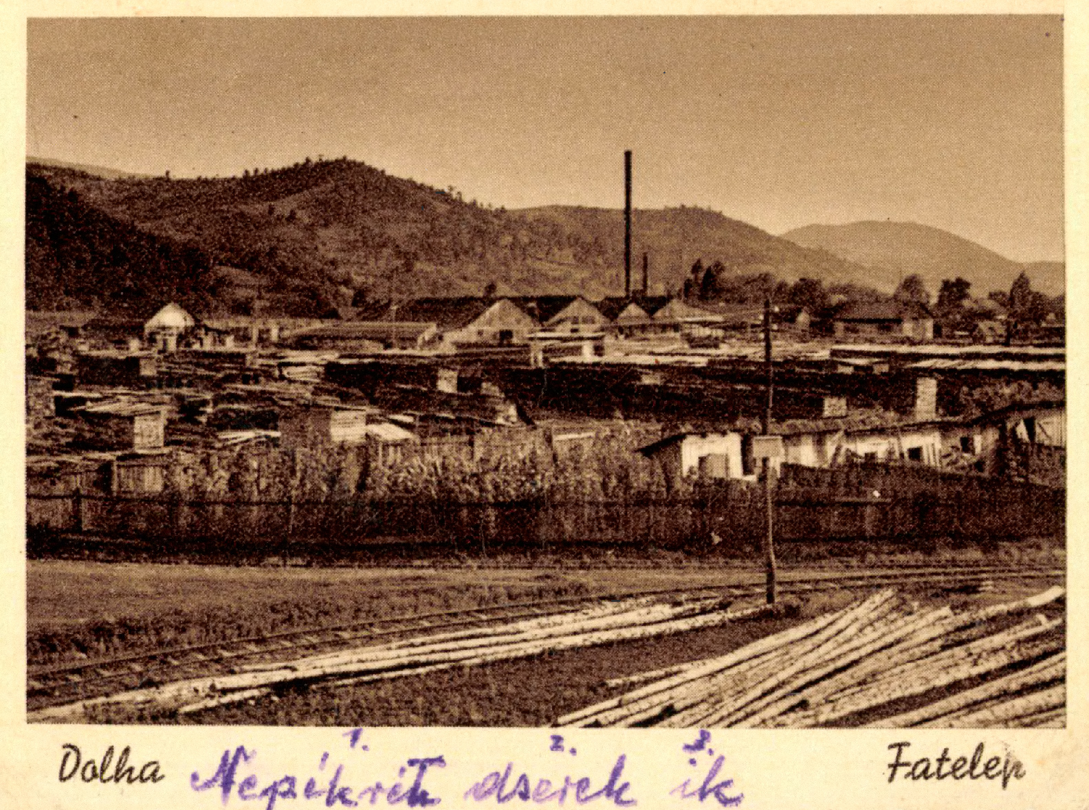 Лесопильный завод с.Долгое, 1940г.